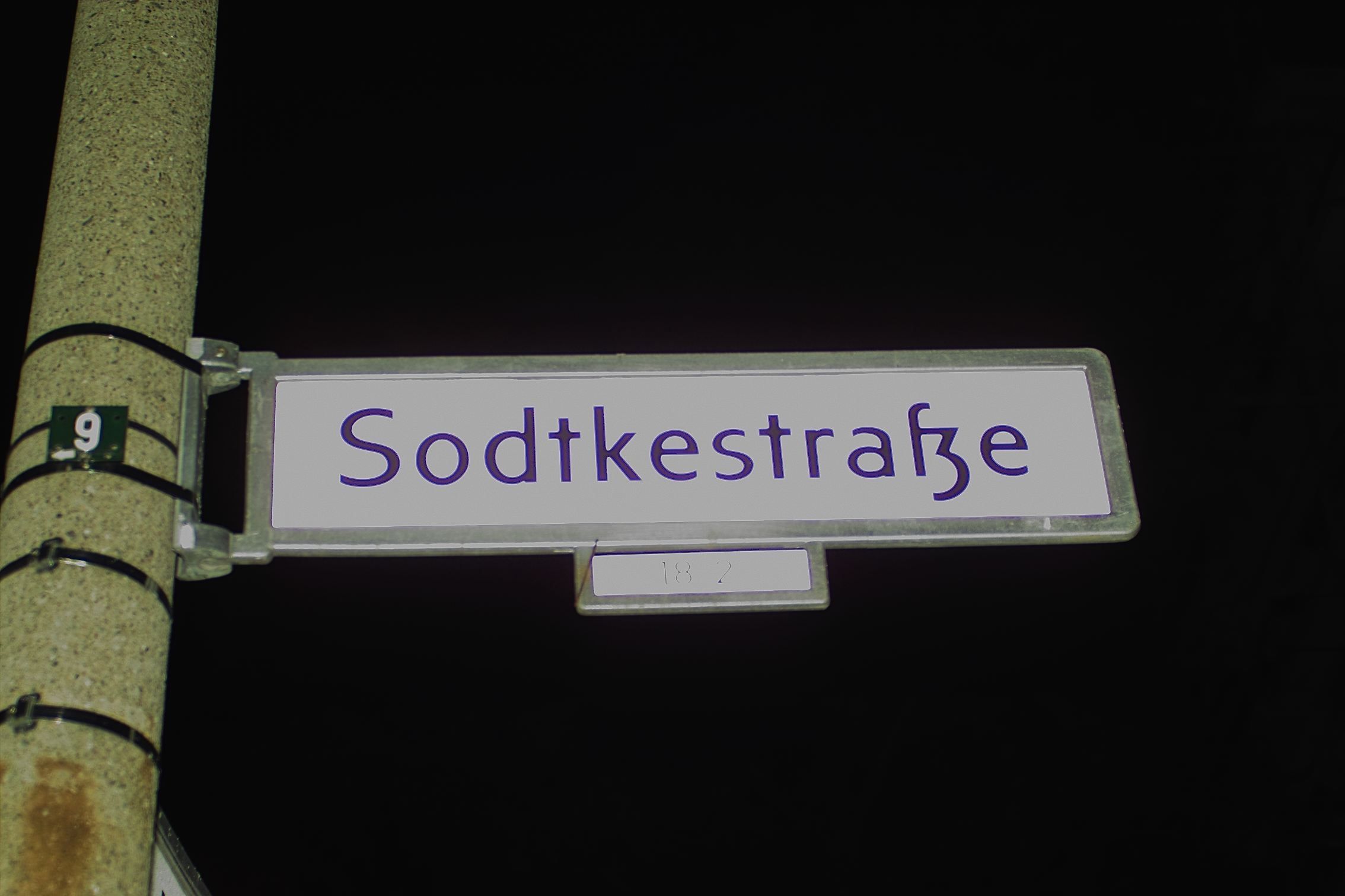 Straßenschild